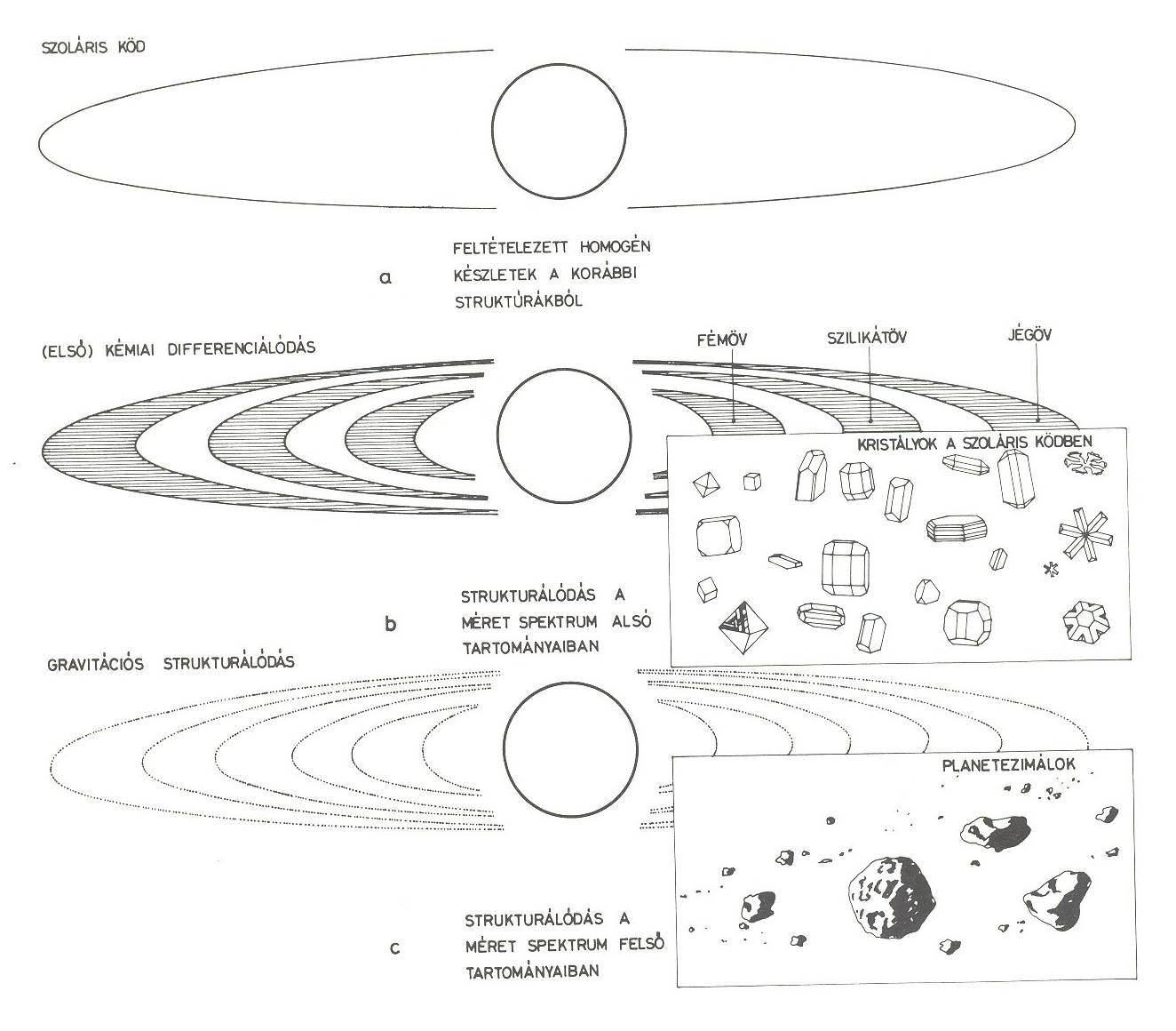 A Naprendszerben zajló kettős kristályosodás modellje. Ásványok, majd bolygótestek keletkezése.